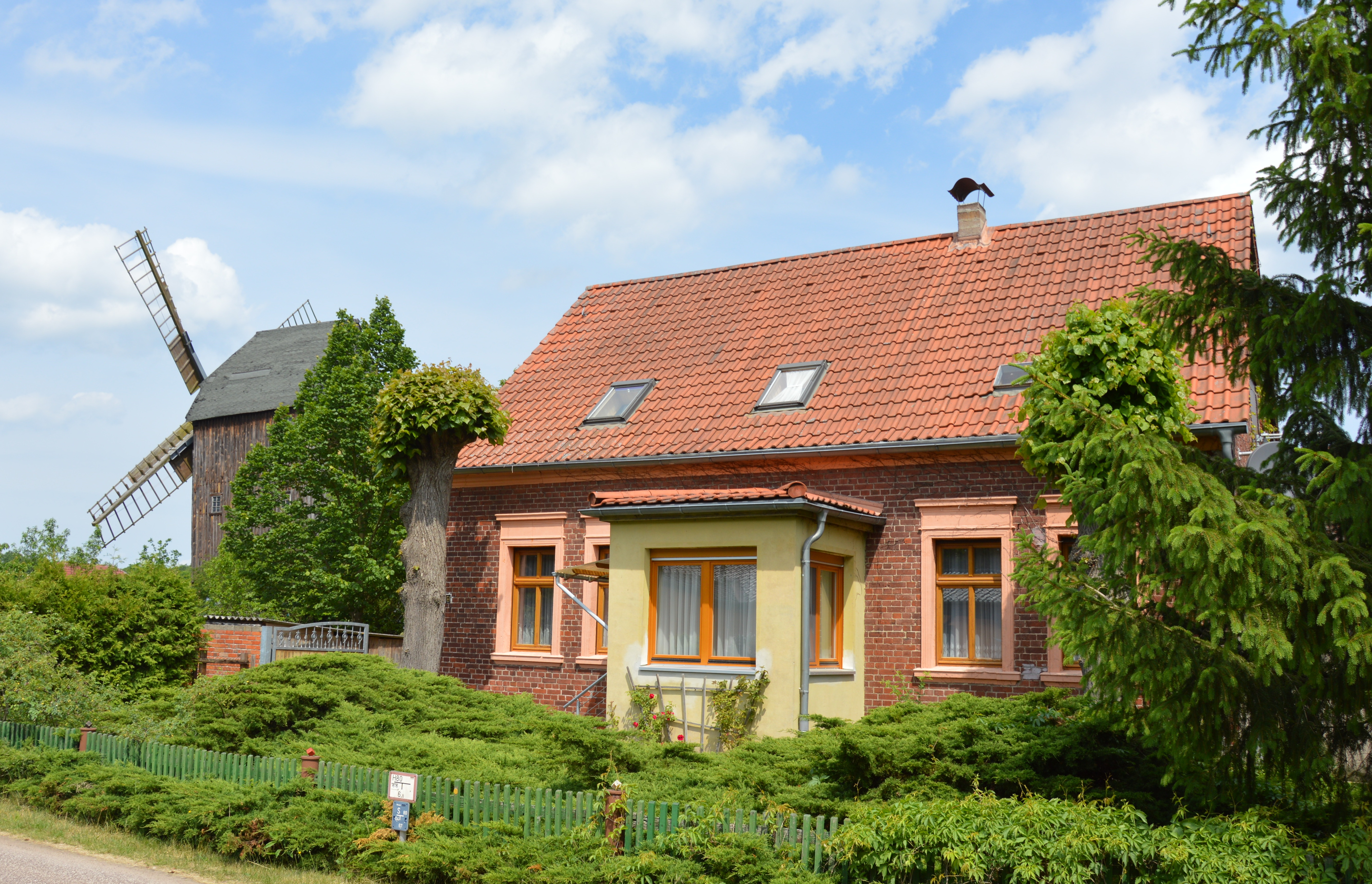 Windmühle Mützel